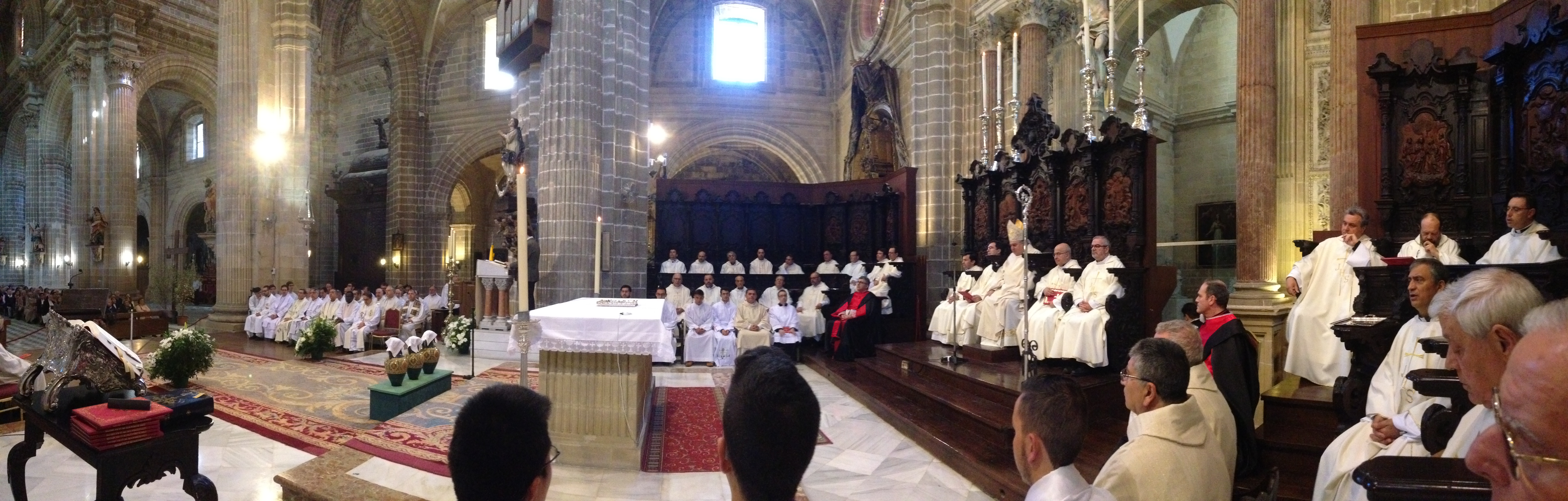 Celebración de la Misa Crismal presidida por Mons. Mazuelos, en la Catedra de Jerez